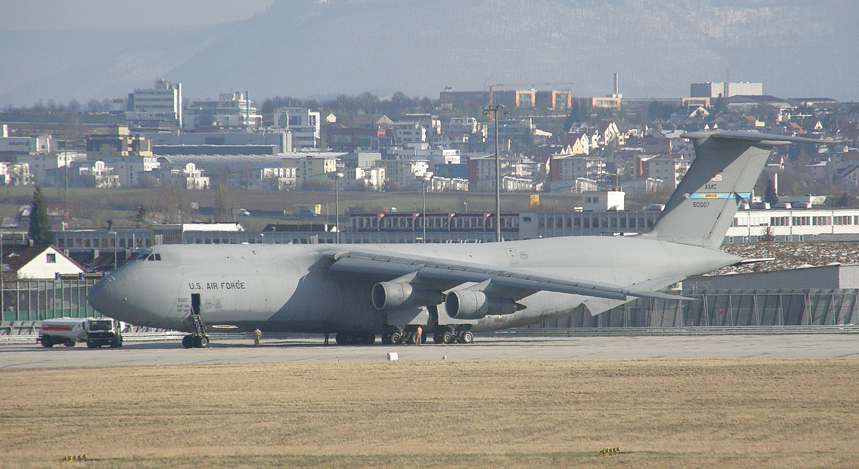 Ein Flugzeug der US Air Force in Stuttgart